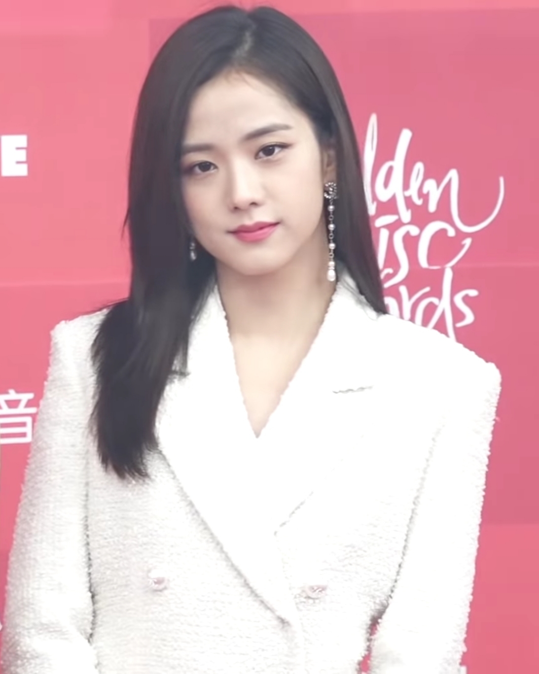 20190106 (NEWSEN) 블랙핑크(BLACKPINK), 수줍은 많은 소녀지만 돋보이는 아름다운 미모 (Glden Disc Awards 2019)